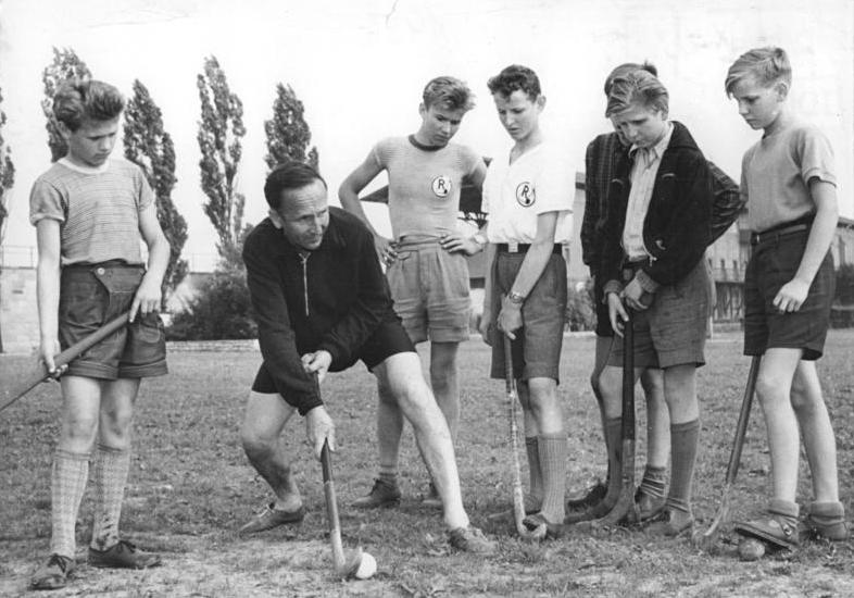 Zentralbild Funck 9.7.56 Ein Besuch beim SC Rotation Leipzig. Der im Februar 1955 gegründete Sport-Club Rotation Leipzig ist mit 750 Mitgliedern in 7 Sektionen einer der stärksten Clubs der DDR geworden. 17 Meister des Sports ist bis jetzt das Ergebnis der wissenschaftlichen Trainingsarbeit innerhalb des Sportclubs. UBz. Der Hockeytrainer Werner Grabow betreut nicht nur die Hockeyspieler des Clubs, sondern auch einige Schüler und BSG-Mannschaften.